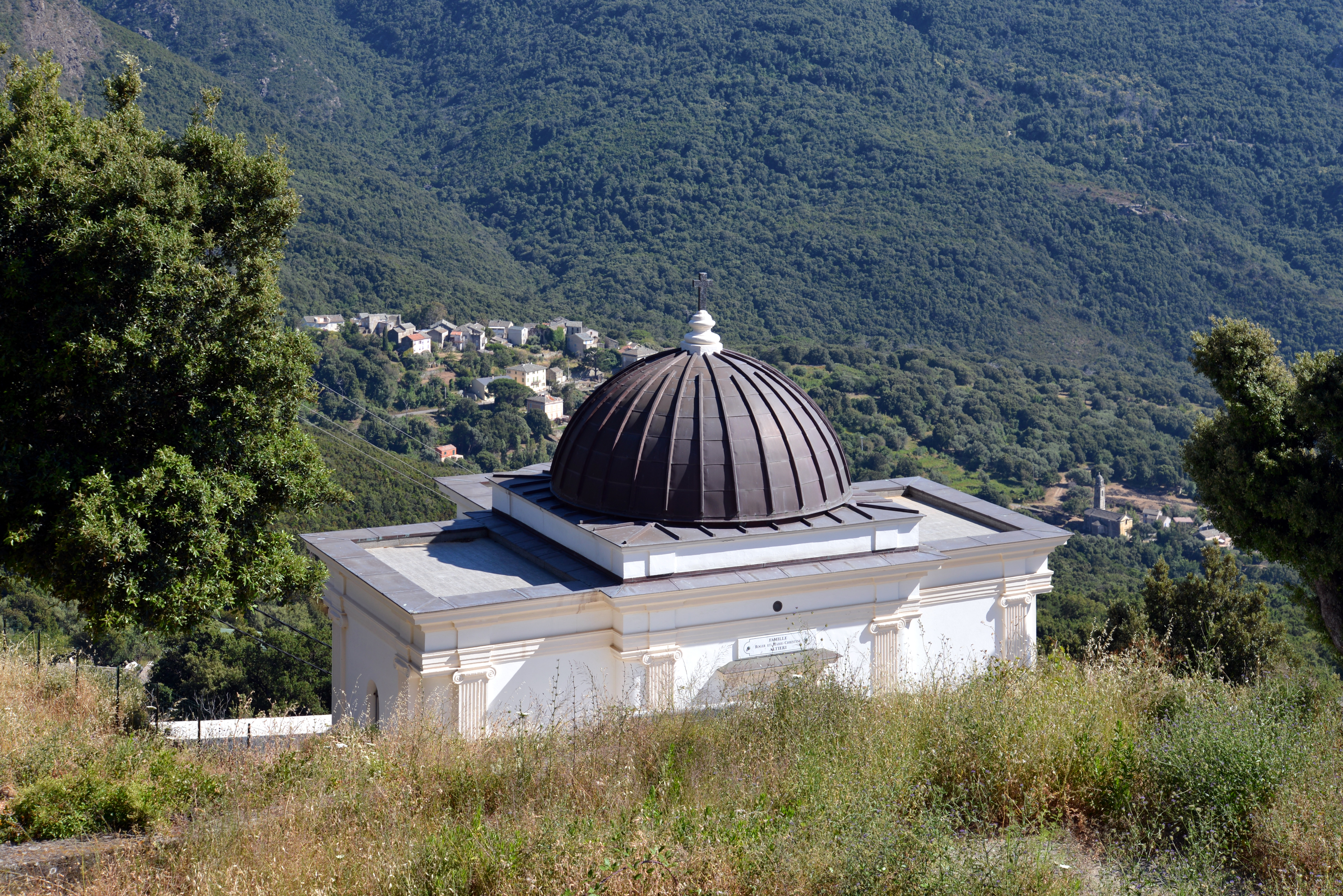 Barrettali, Cap Corse - Chapelle funéraire de la famille Roger et Marie-Christine Altieri. À l'arrière-plan, à droite, L'Annonciada avec son église qui appartenait à un petit couvent de Servites construit en 1590 et abandonné par les religieux en 1790. À gauche, le hameau de Conchigliu.